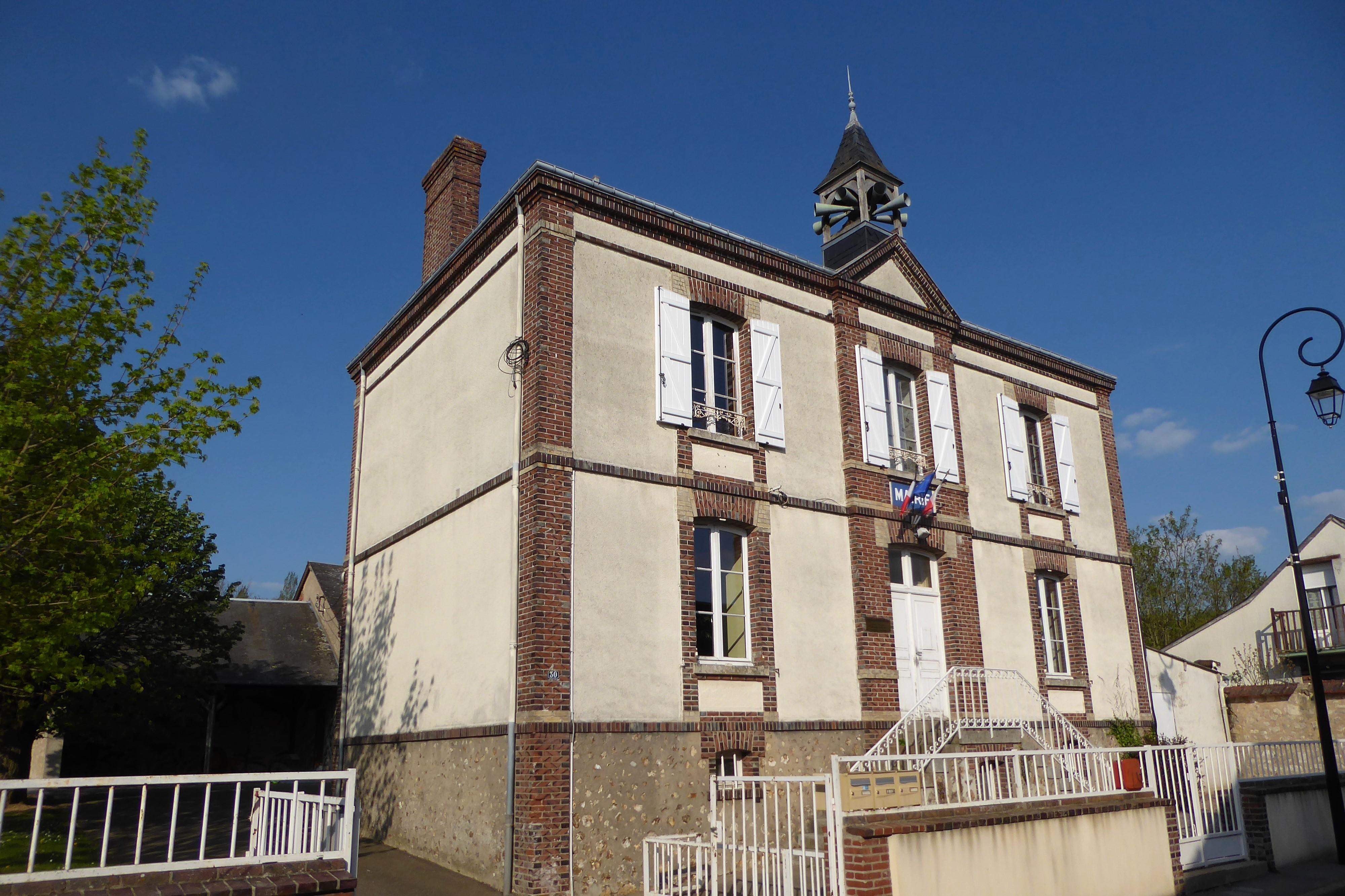 mairie de Beaumont-les-Autels, Eure-et-Loir, France.